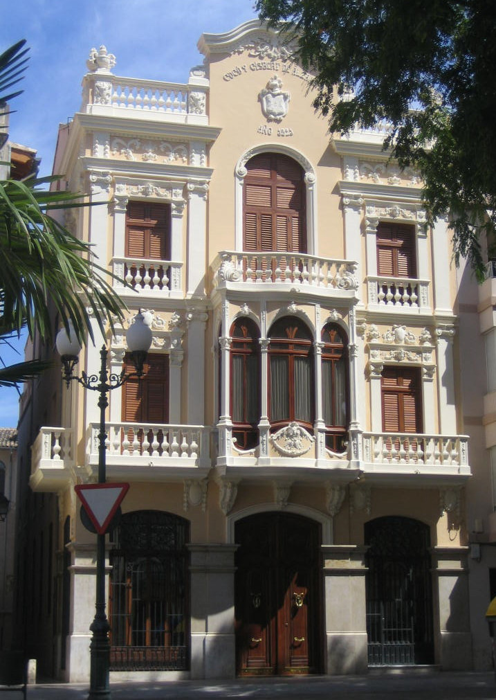 Fachada principal de la casa Cucó-Gisbert de Alzmora en Alzira (España).